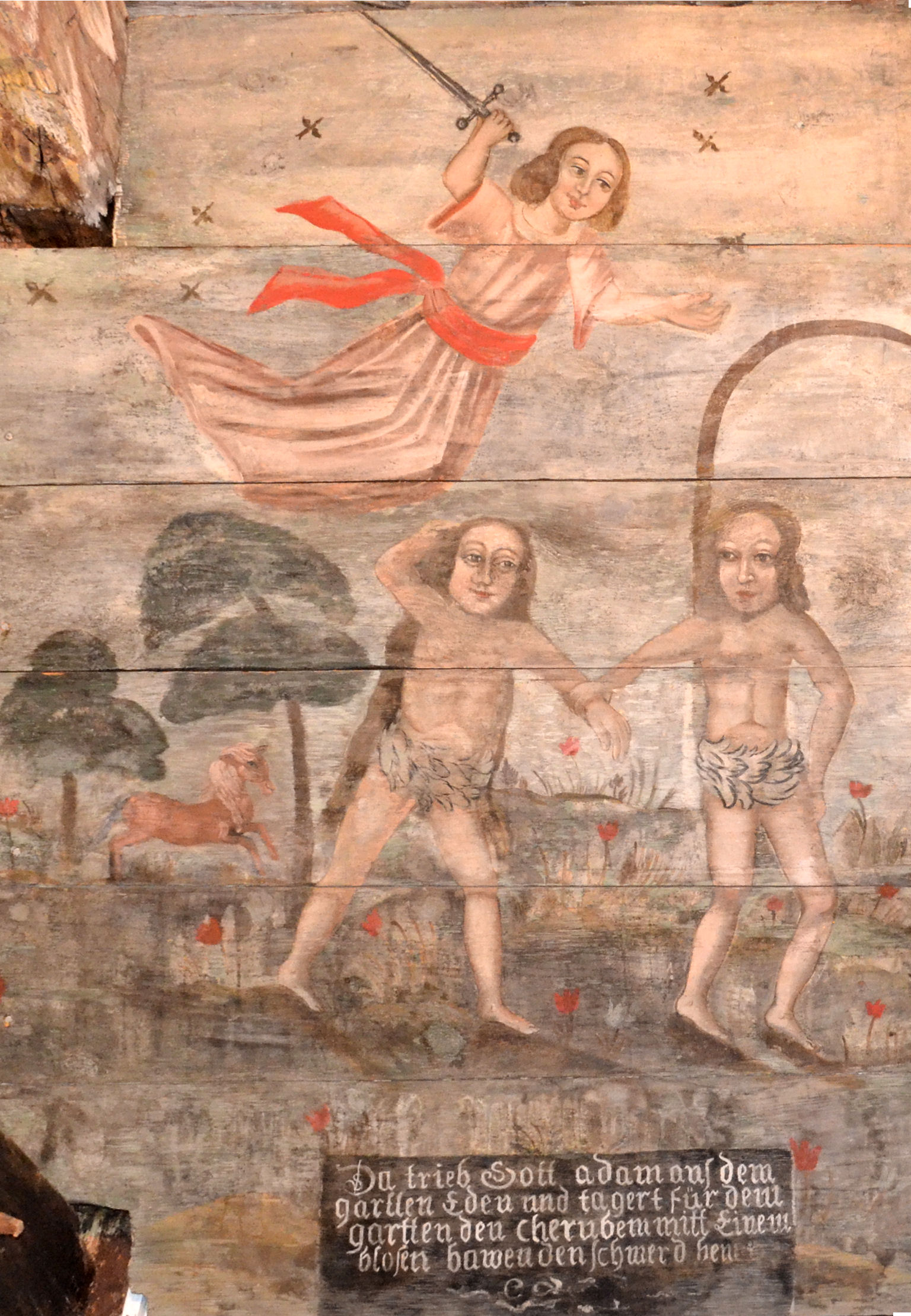 Kościół w Dzisnej (województwo zachodniopomorskie)